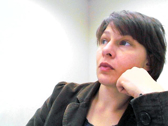 на лекции, май 2013